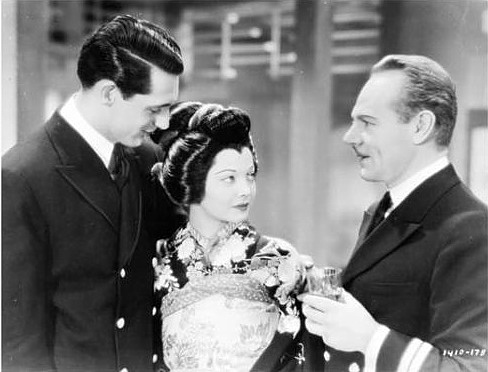 Cary Grant & Sylvia Sidney taken for film Madame Butterfly (1932). See also film still. No copyright notice.